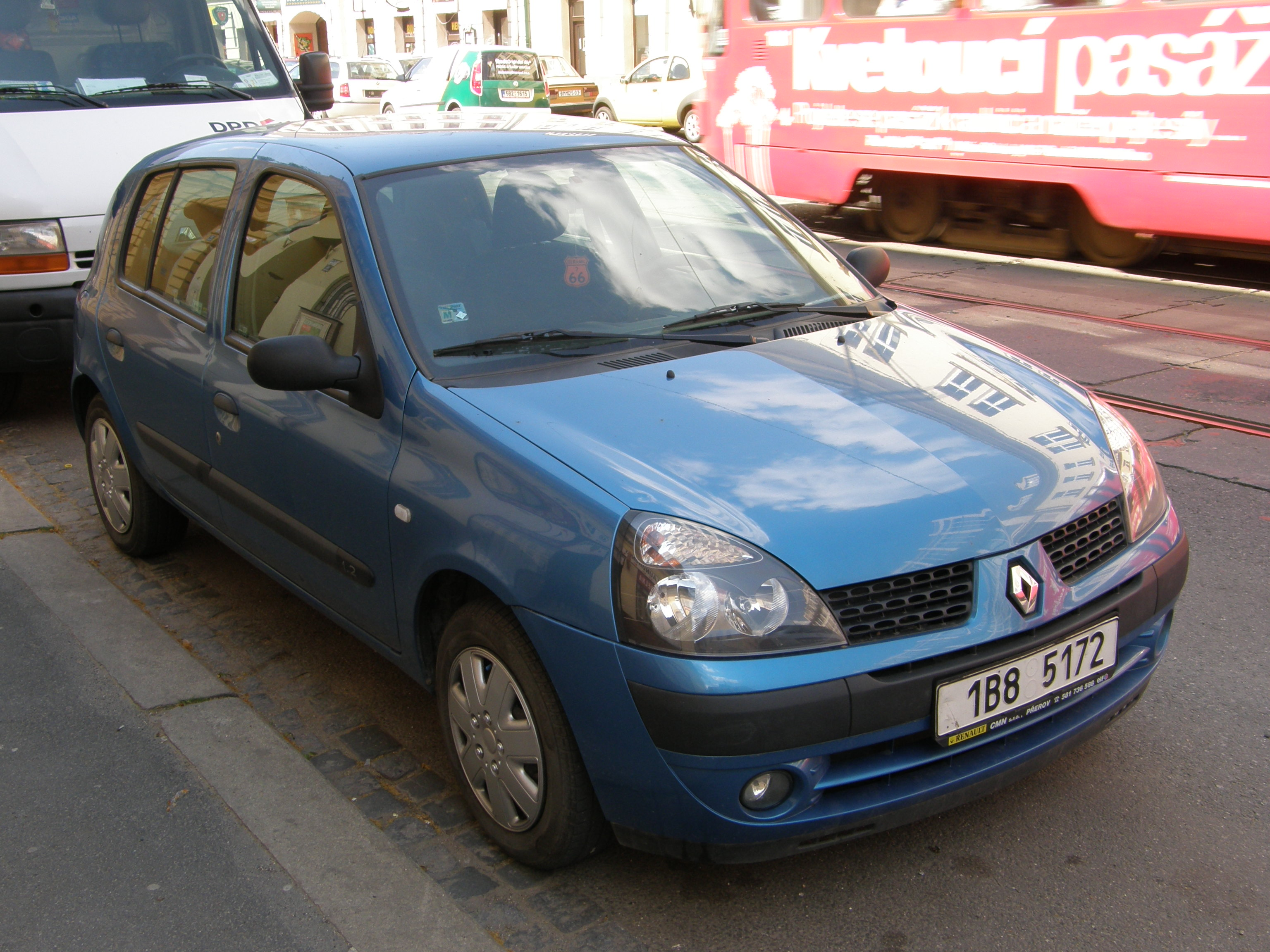 Renault Clio